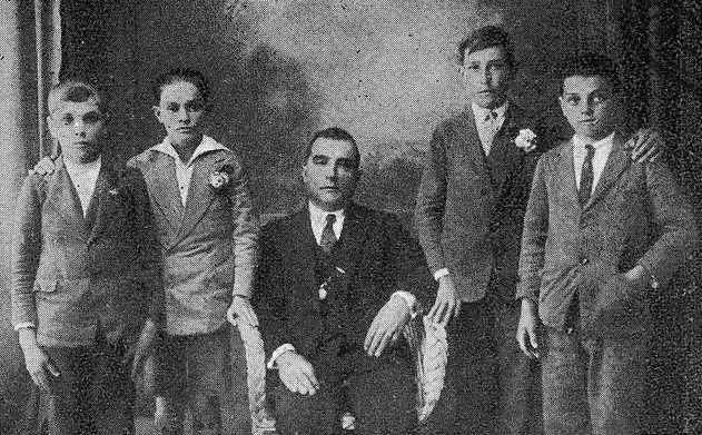 José Vázquez Grela cos seus alumnos premiados pola FAR da Estrada en Buenos Aires, fotografía en Vida Gallega 1930